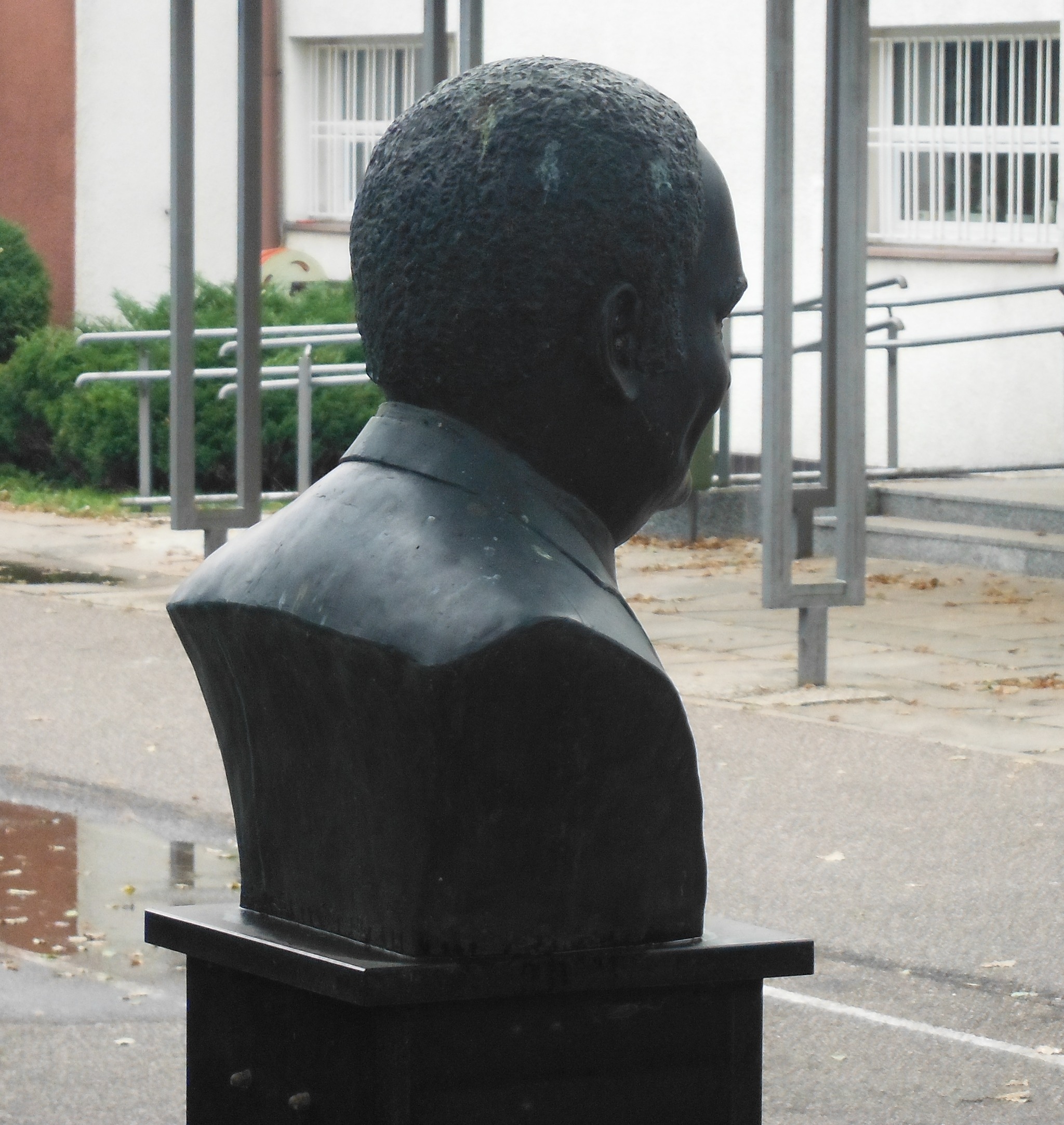 Popiersie René Goscinny'ego na Saskiej Kępie w Warszawie.